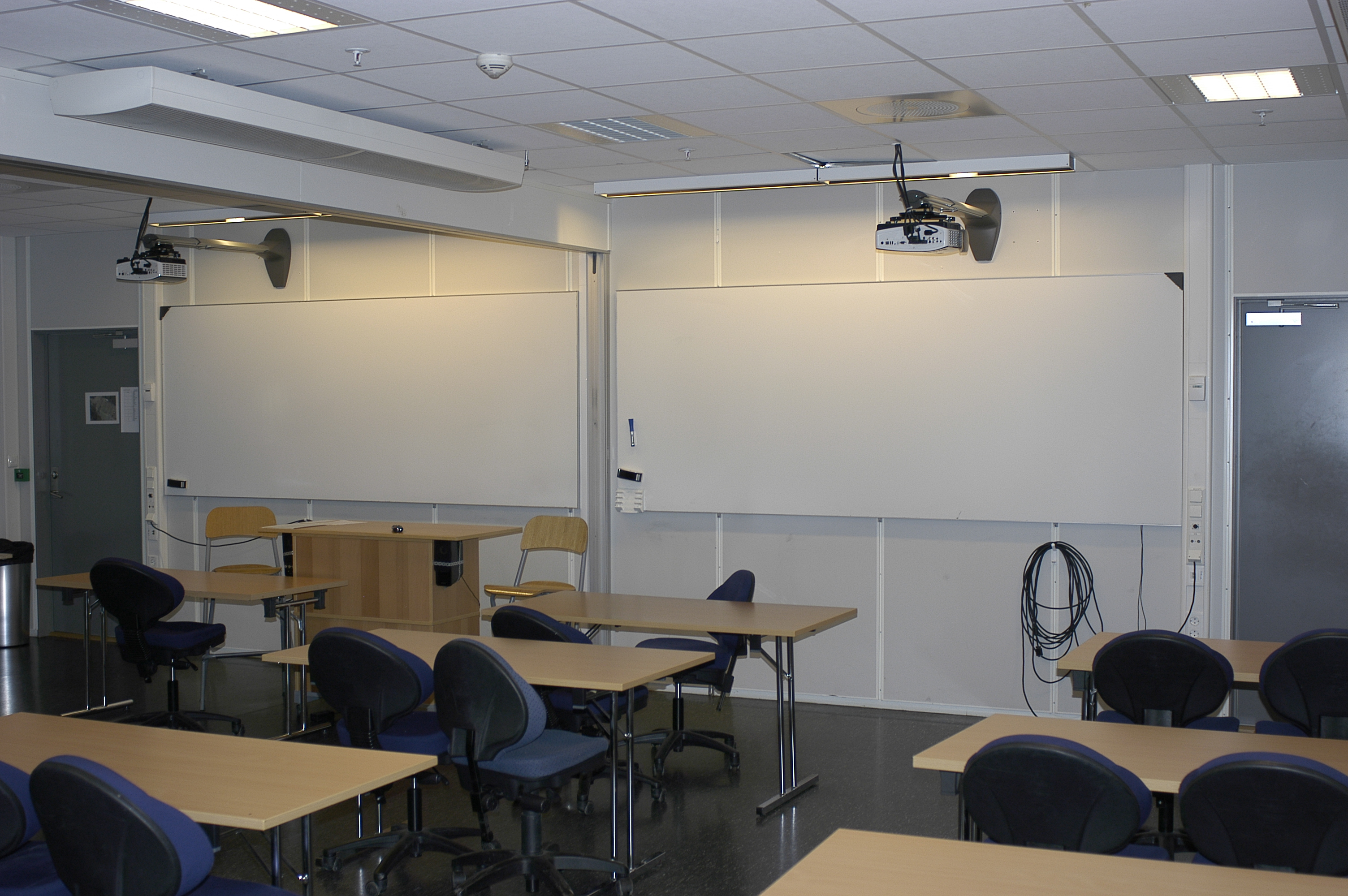 Et av klasserommene som kan deles i to.